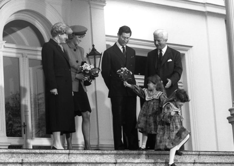 Bonn, 2. November 1987 Auf Einladung des Bundespräsidenten statteten der Prinz und die Prinzessin von Wales der Bundesrepublik Deutschland vom 2. bis 7. November 1987 einen Besuch ab. Nach dem Staatsbesuch der britischen Königin im Jahre 1978 handelte es sich um den ersten offiziellen Besuch. Nach ihrem Aufenthalt in Bonn am 2. November starteten Prinz Charles und Prinzessin Diana zu einer fünftätigen Rundreise durch die Bundesrepublik, die sie nach Köln, München, Hamburg, Celle und Hannover führte. Vor ihrem Besuch in der Bundesrepublik Deutschland hielten sich der der Prinz und die Prinzessin von Wales aus Anlaß der 750-Jahr-Feierlichkeiten einen Tag lang in Berlin (West) auf. Im Bild: Ein kleines Zwillingspaar überreicht Prinzessin Diana und Frau von Weizsäcker einen Blumenstrauß auf der Terrasse der Villa Hammerschmidt. v.l.n.r.: Frau Marianne von Weizsäcker, Prinzessin Diana, Prinz Charles und Bundespräsident Dr. Richard von Weizsäcker